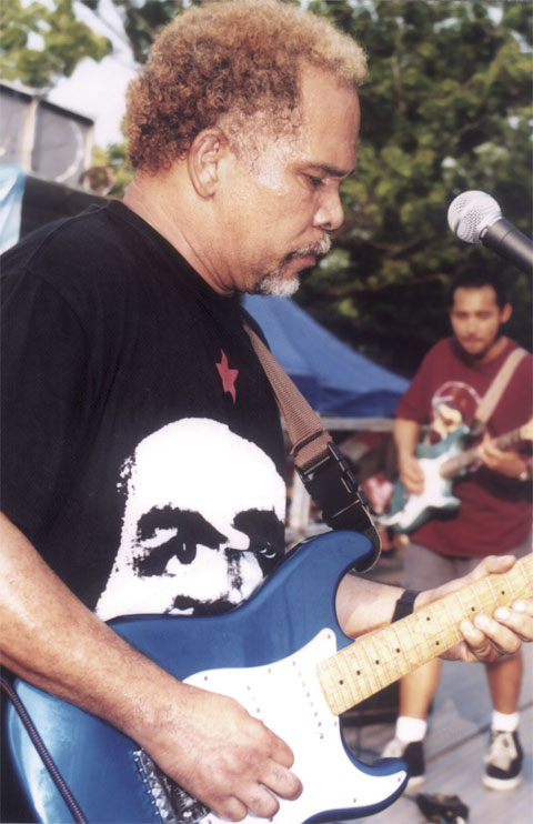 Foto realizada por Rfael De Los santos en el 2003 en New York.